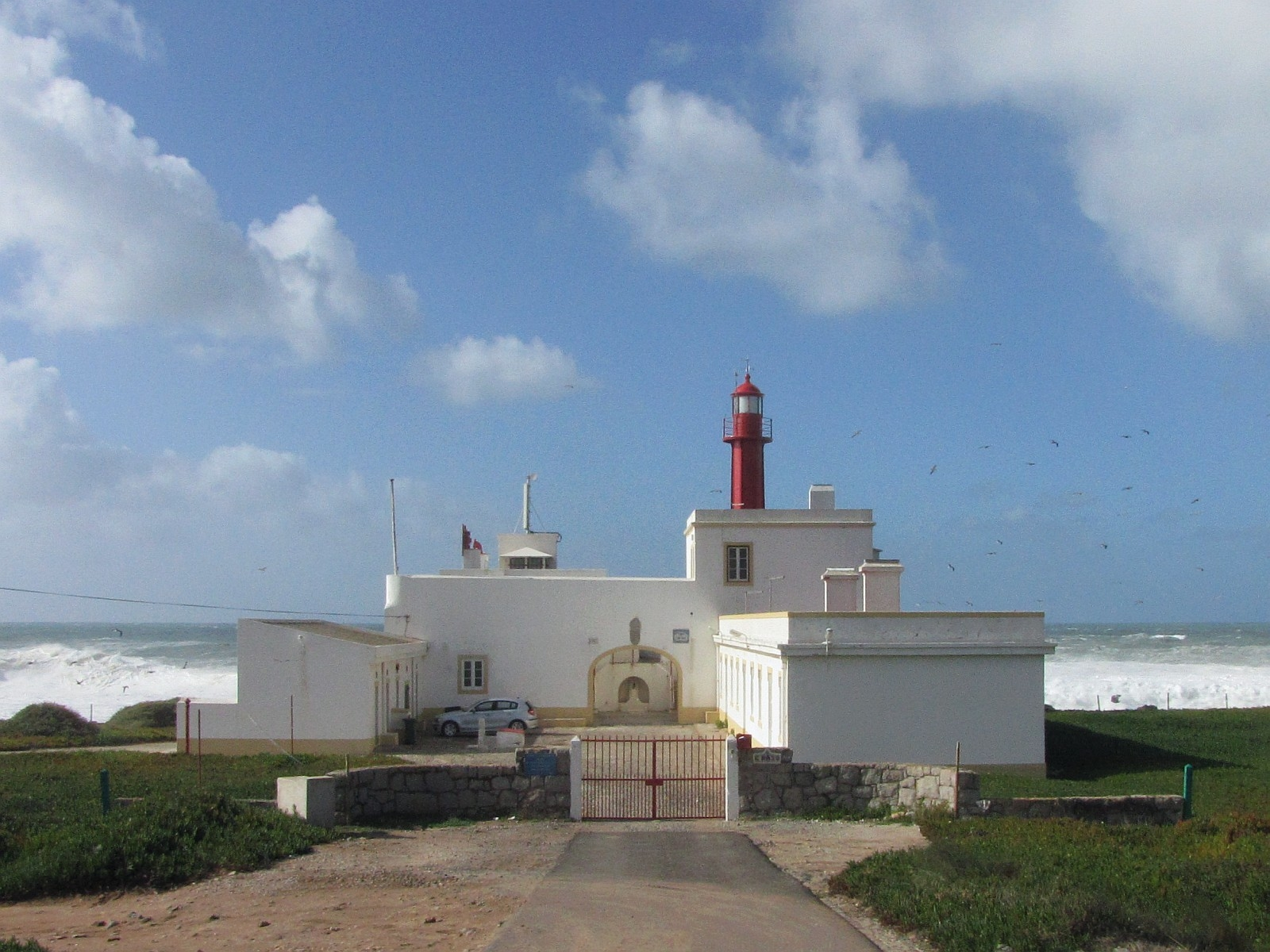 Die Festungsanlage Forte de São Brás de Sanxete & Farol do Cabo Raso Leuchtturm Cascais Portugal Foto Wolfgang Pehlemann Steinberg/Ostsee IMG_8566